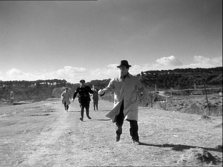 Screenshot del film Guardie e ladri (1951) diretto da Mario Monicelli e Steno